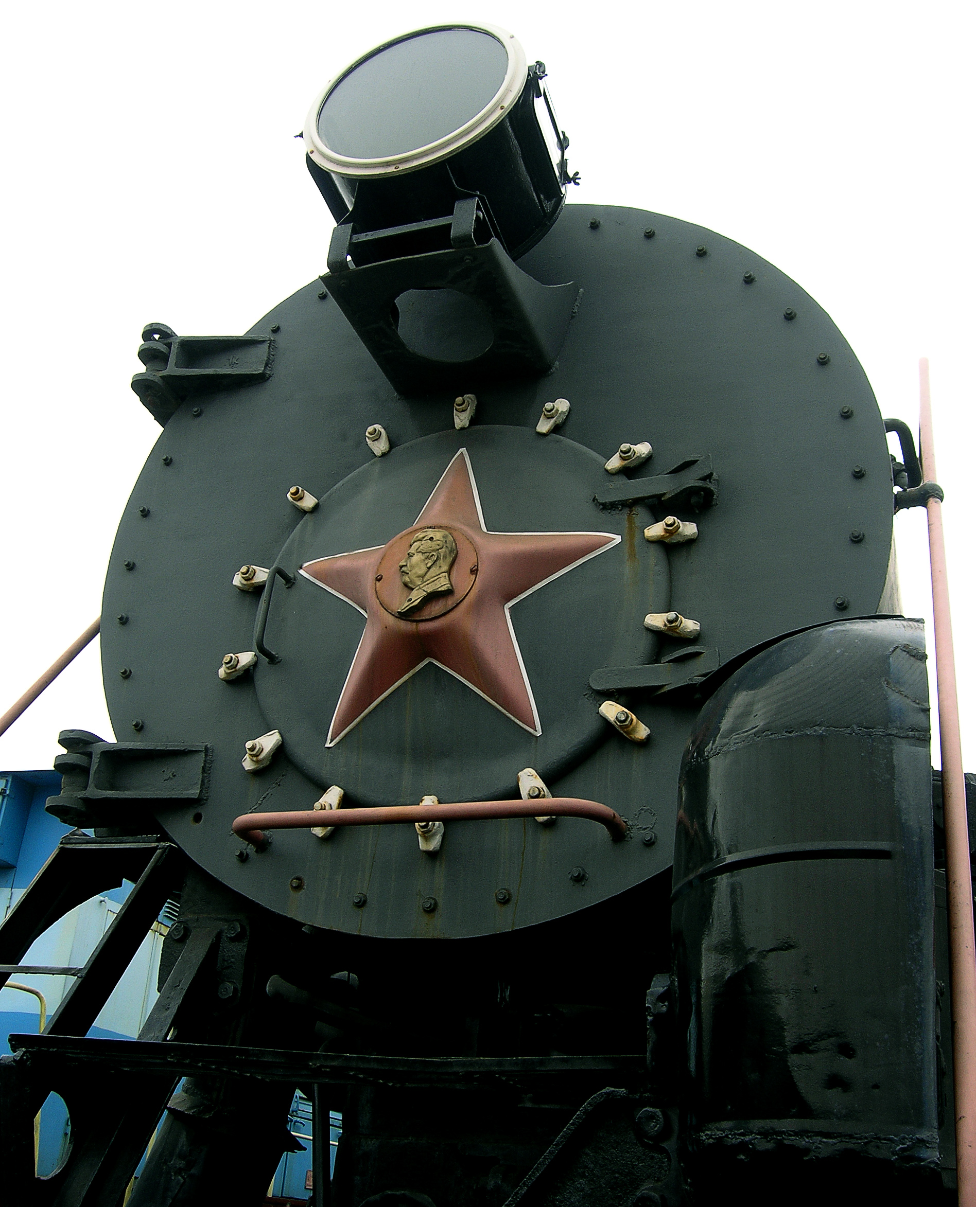 Донецкий музей паровозовС профилем вождя